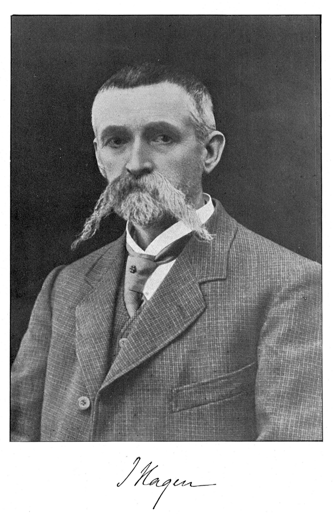 Ingebrigt Hagen, Norwegian bryologist